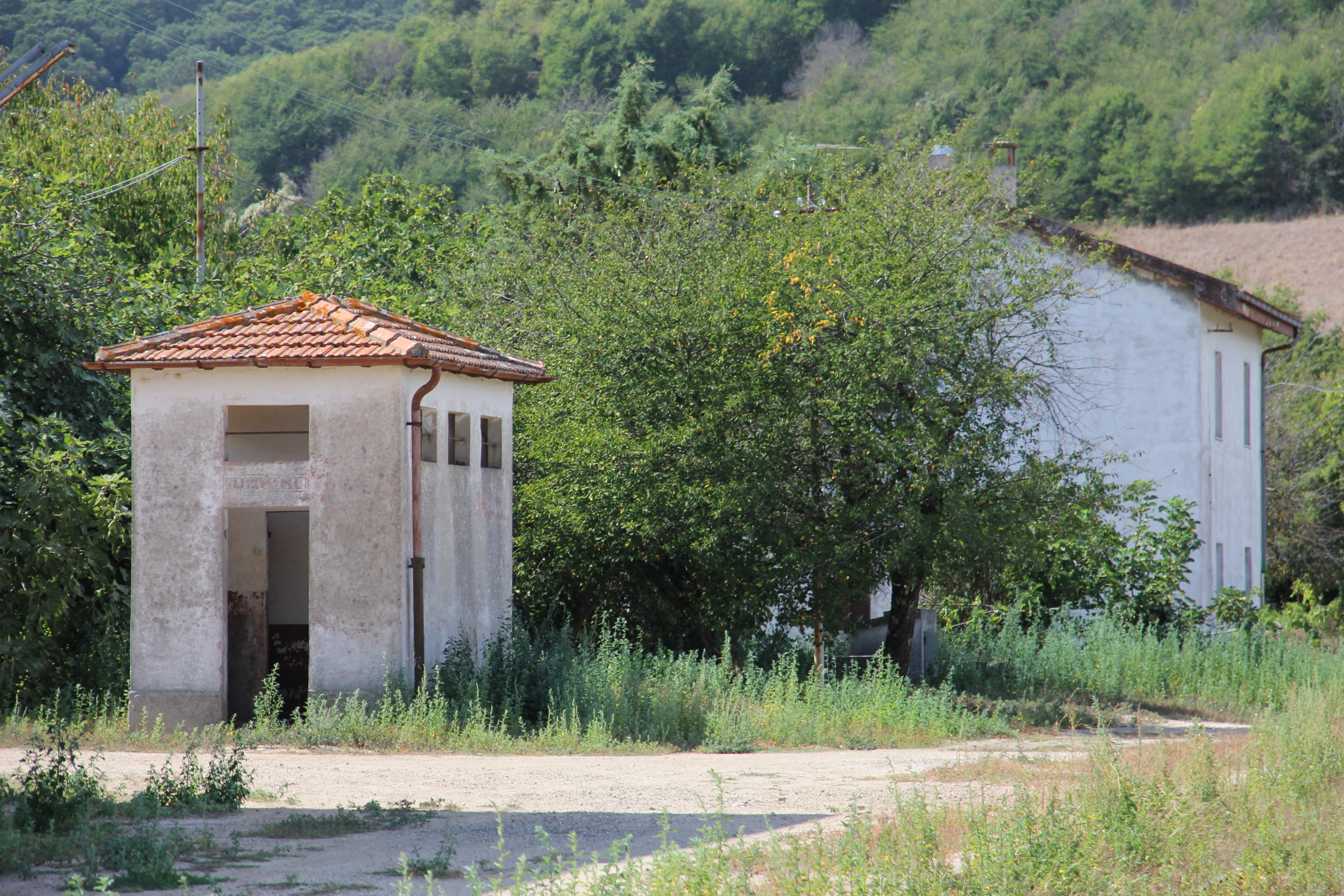 Aggius - Stazione ferroviaria